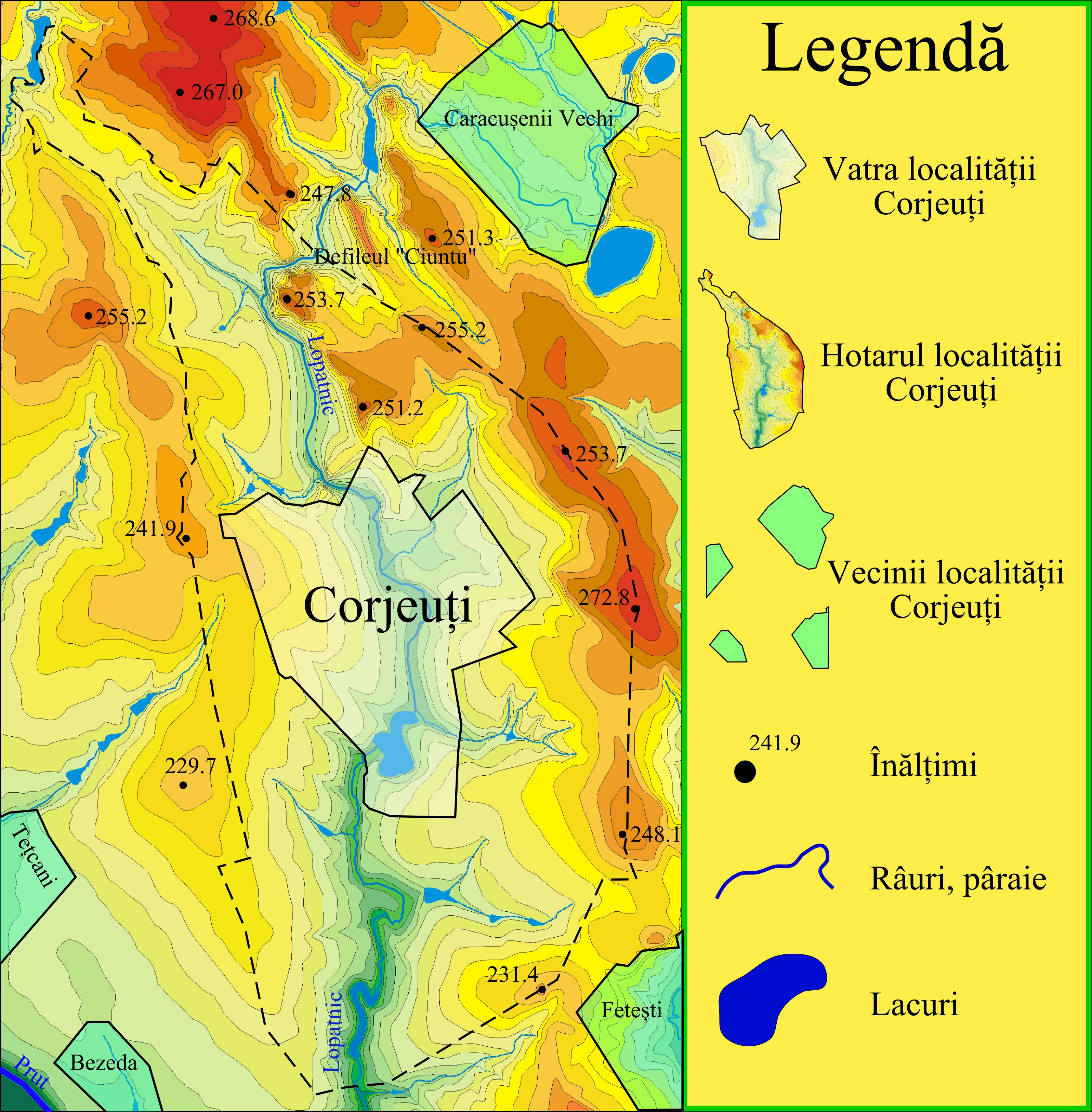 Relieful si vecinătățile comunei Corjeuți